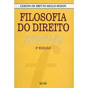 Filosofia do Direito: interpretação antropológica. Autor: Gerson Boson